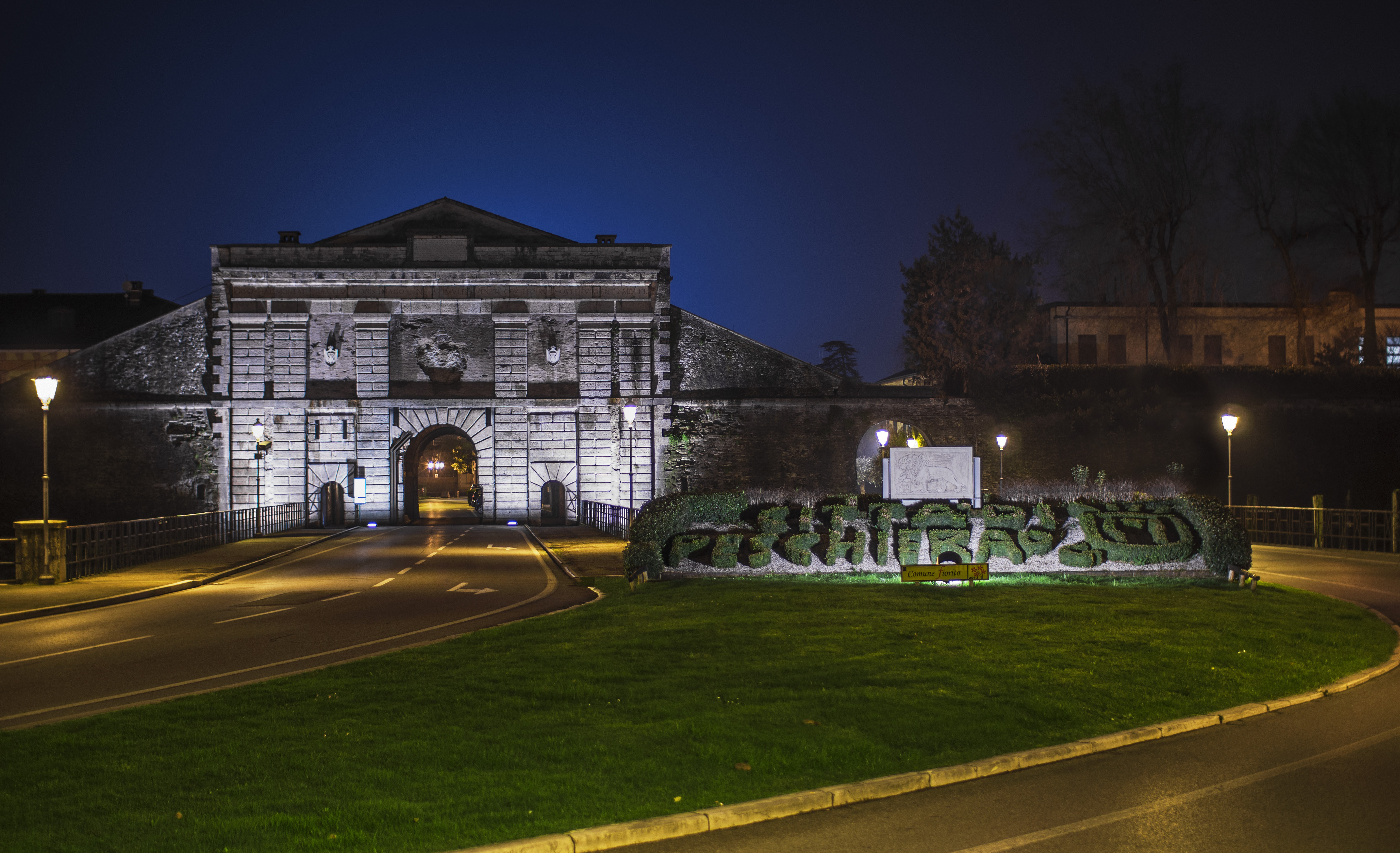 Porta Verona è uno dei due ingressi principali alla città di Peschiera e faceva parte della struttura difensiva del centro storico. Vi si accede attraverso un ponte di cotto chiamato Ponte dei Voltoni. Risale ai tempi della dominazione veneziana, come testimonia la scritta latina posta sulla trabeazione a monito degli stranieri: DISCE HAEC MONEAT PRAECELSA LEONIS IMAGO NE STIMULES VENETI CEV LEO IN HOSTE VIGENT MDLIII (Che tu sappia. Questa eccelsa immagine del leone ti dissuada dal provocare i Veneti giacché essi contro il nemico hanno il vigore del leone 1553). Di quel leone è oggi visibile solo il solco lasciato dalle truppe napoleoniche che invasero la città e distrussero l'effige della Serenissima Repubblica di Venezia. Oltre Porta Verona spiccano il giallo e rosso, simboli delle armi italiane e austriache, che colorano la Caserma d'Artiglieria di Porta Verona, grande arsenale fatto costruire da Radetzky nella piazzaforte di Peschiera tra il 1854 e il 1857. Restaurato e aperto al pubblico nel 2002, è oggi sede della Biblioteca Civica e dell'Archivio Storico del Comune. This is a photo of a monument which is part of cultural heritage of Italy.